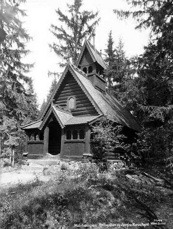 Fiskakapellet på Maihaugen i Lillehammer kommune. Det einaste bevarde lafta mellomalderkyrkjebygget i Noreg.